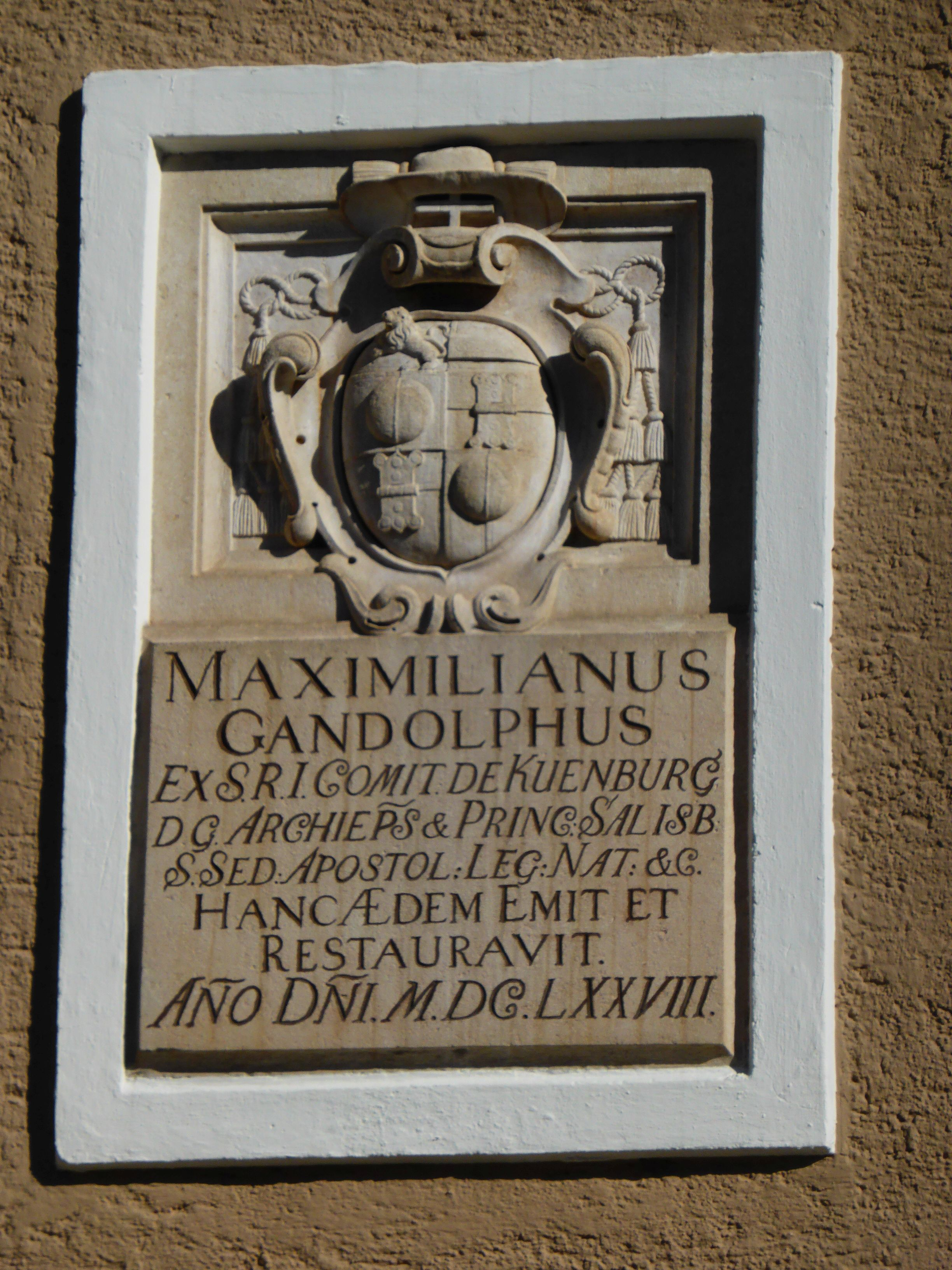 Inschrifttafel